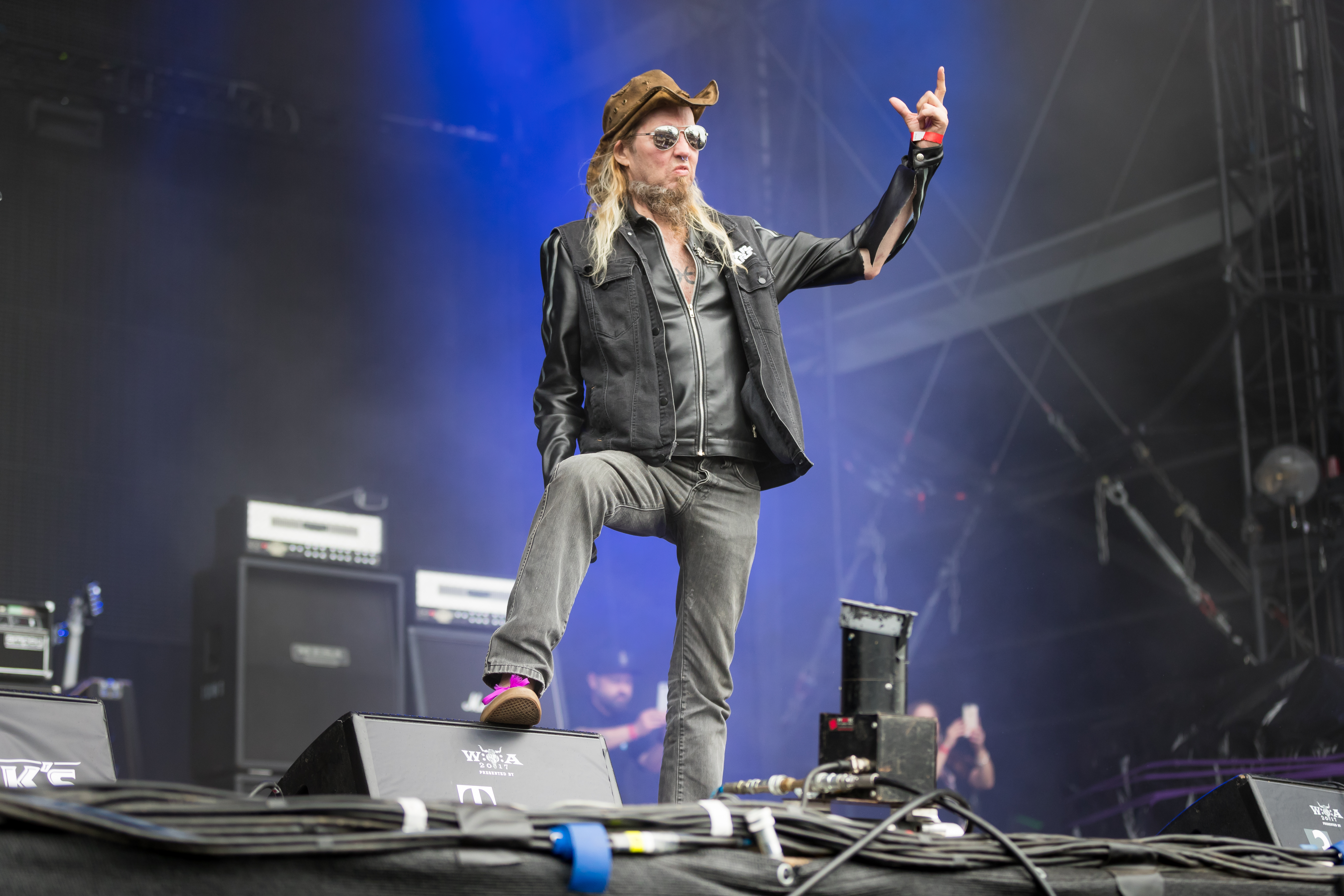 Sanctuary during Wacken Open Air at Schleswig-Holstein, Wacken, , Germany on 2017-08-04, Photo: Sven Mandel